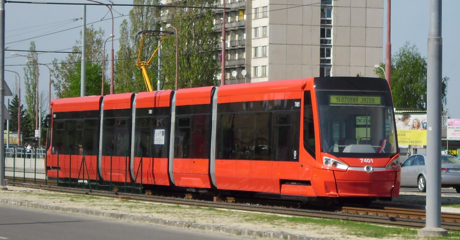 Škoda 29 T